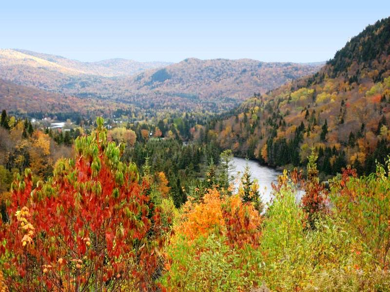 Vallée de la Jacques-Cartier à Tewkesbury